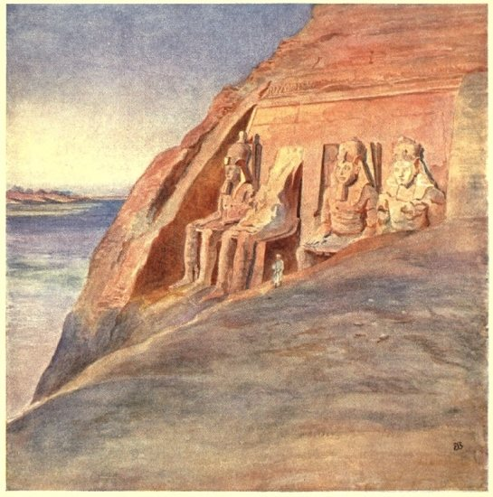 картины британской художницы-баталиста Элизабет Томпсон